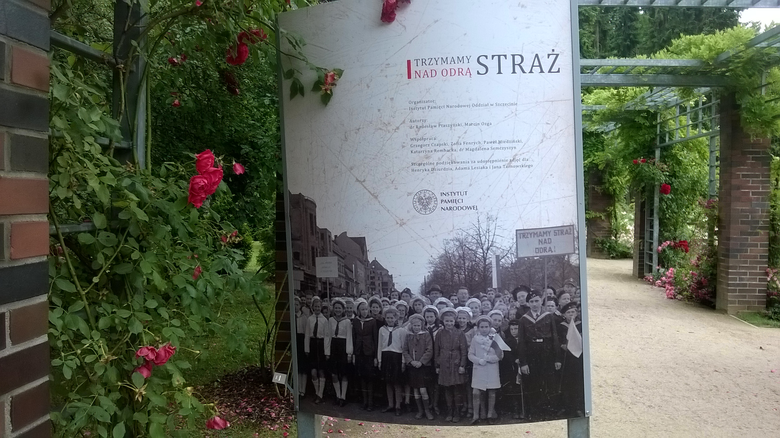 Wystawa historycznych fotografii w Ogrodzie Różanym w Szczecinie